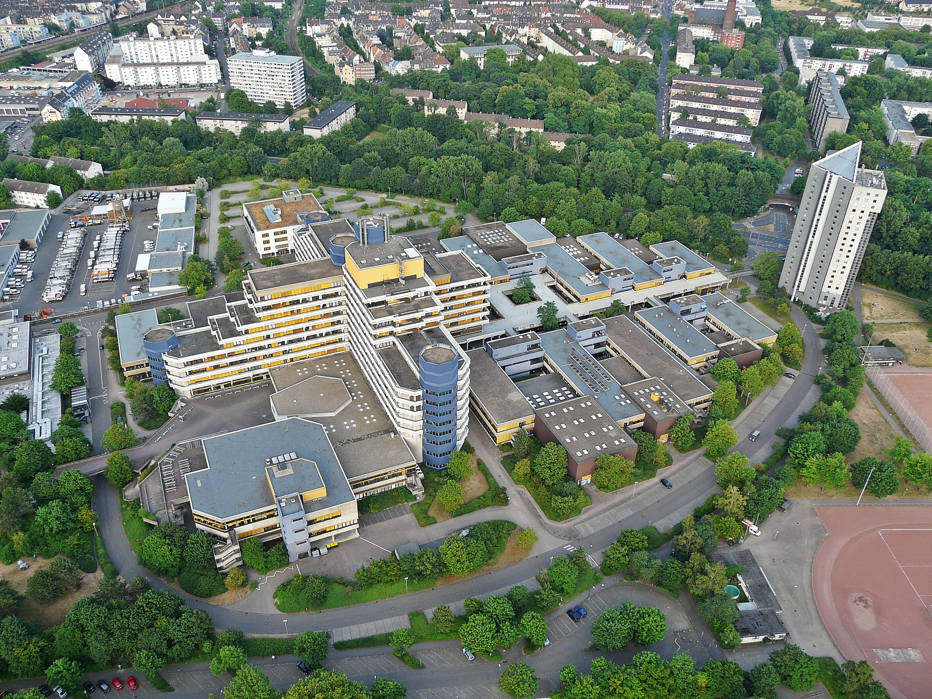 Ingenieurwissenschaftliches Zentrum (IWZ) in Köln-Deutz